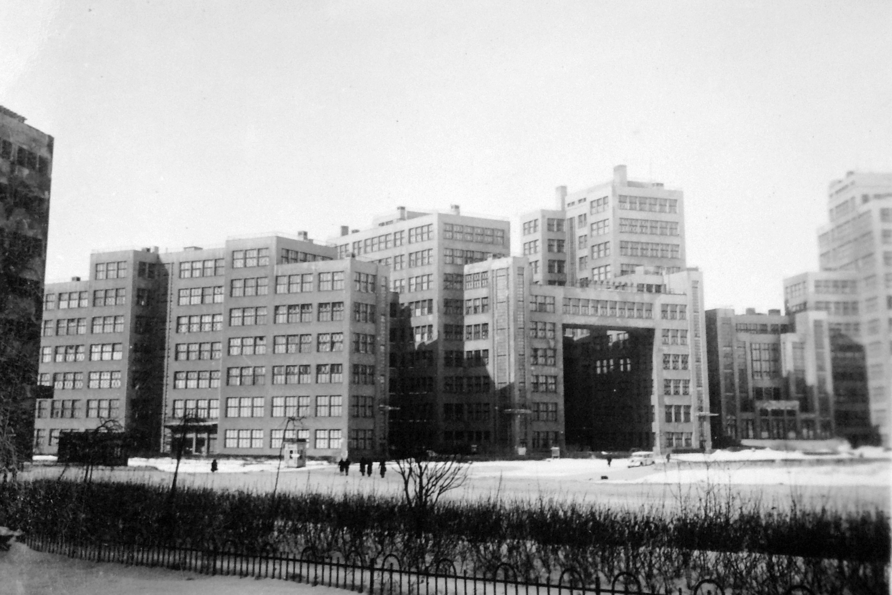 Szabadság (Dzerzsinszkij) tér, a Gosprom épület (Iparpalota). Location: Ukraine, Kharkiv Title: Szabadság (Dzerzsinszkij) tér, a Gosprom épület (Iparpalota).